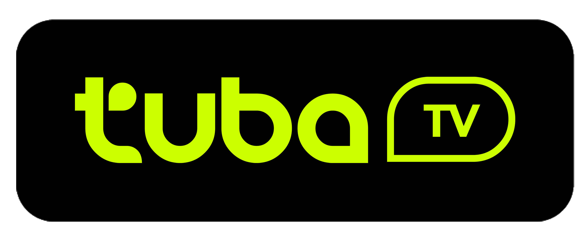 xdfgdf